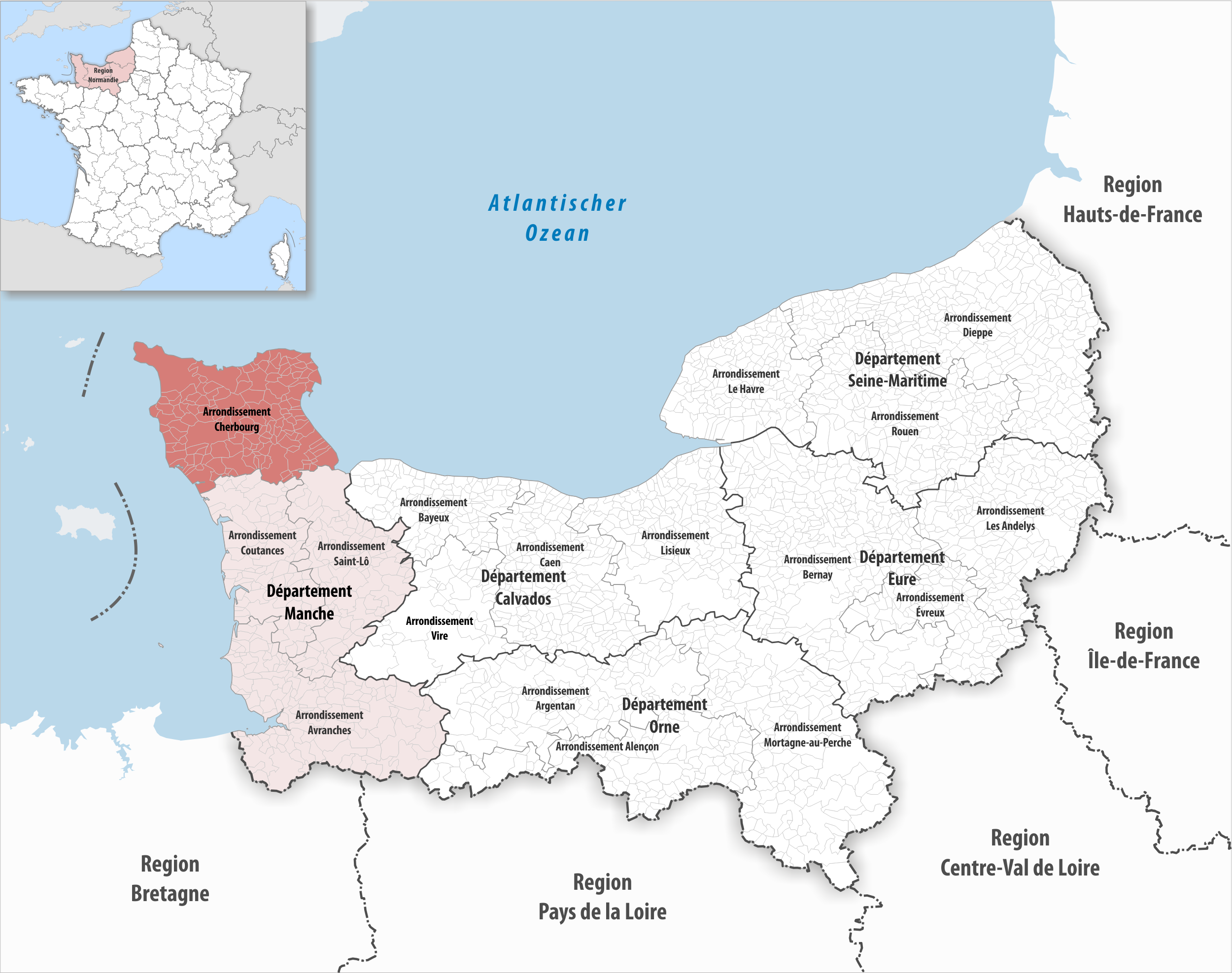 Lage des Arrondissements Cherbourg